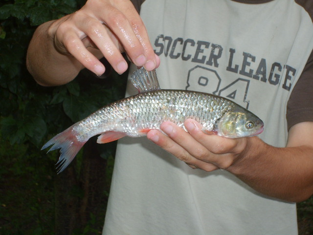 Squalius cephalus